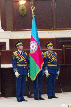 Azərbaycan Prezidentinin bayrağı